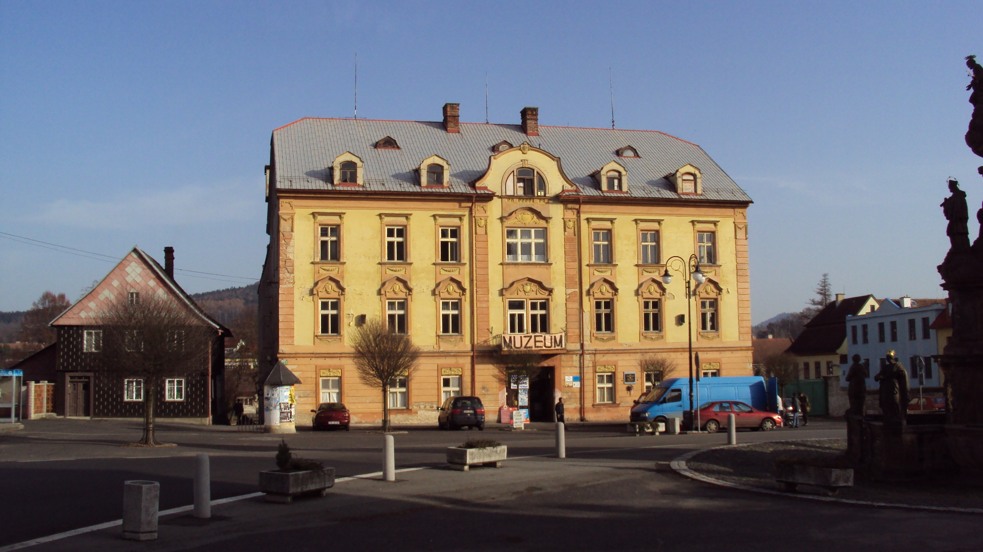 Eduard Held Muzeum na náměstí Svobody v Zákupech